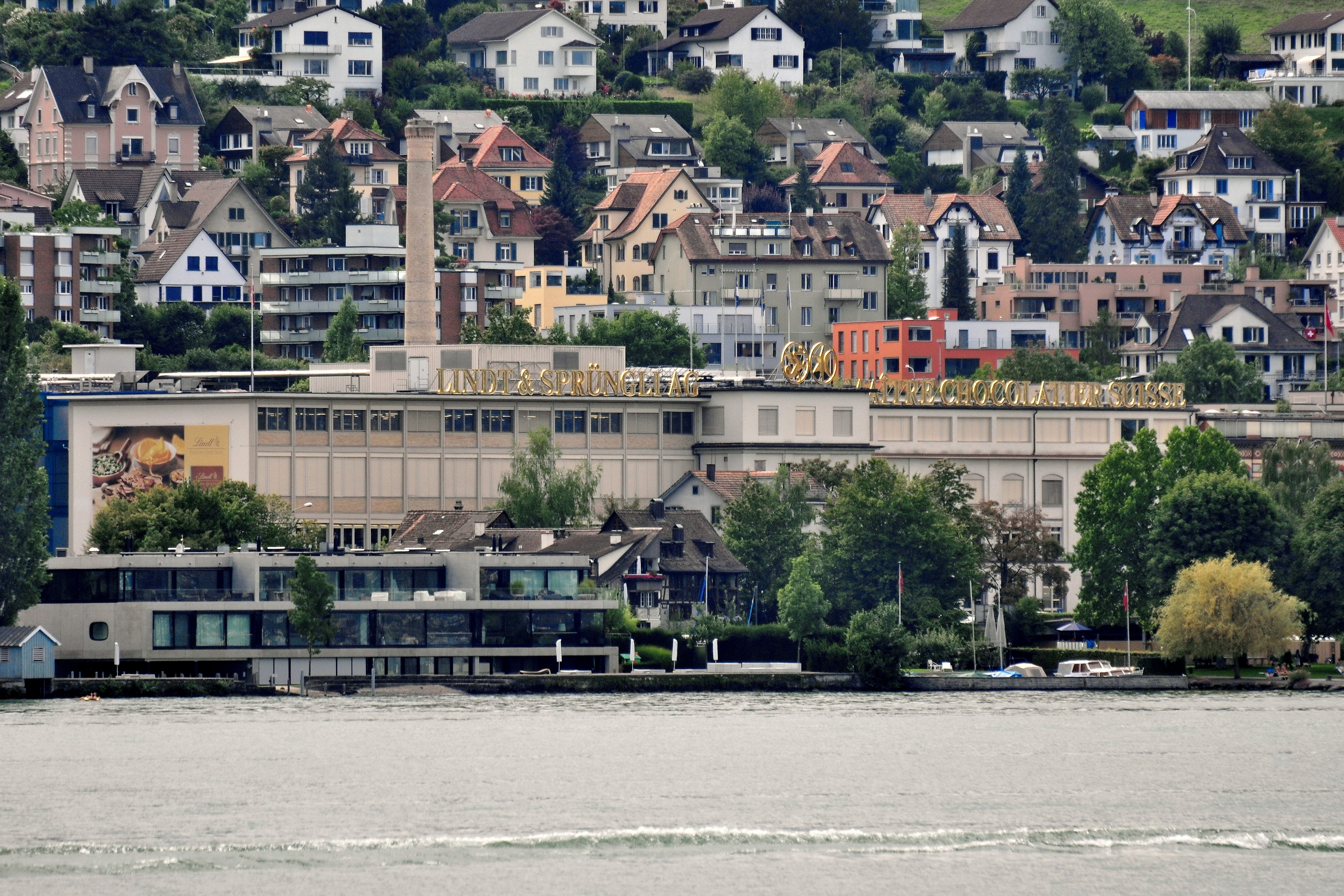 Lindt & Sprüngli in Kilchberg (Switzerland) as seen from Zürichsee-Schifffahrtsgesellschaft (ZSG) motorship Helvetia